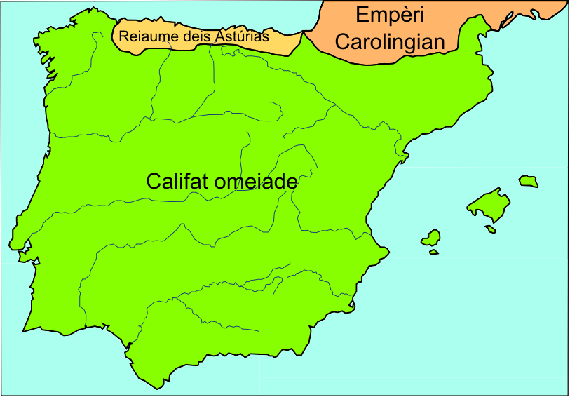 Occitanizacion e simplificacion d'un document realizat per Phirosiberia lo 19 de genier de 2009.